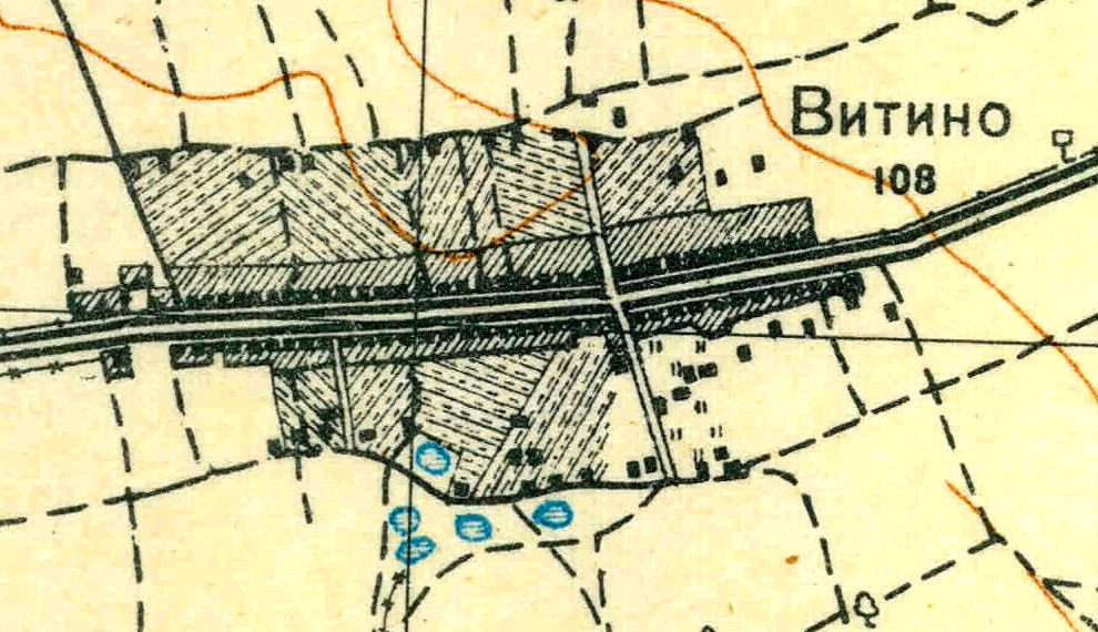 Топографическая карта Ленинградской области, квадрат О-35-24-А-б (Витино), деревня Витино